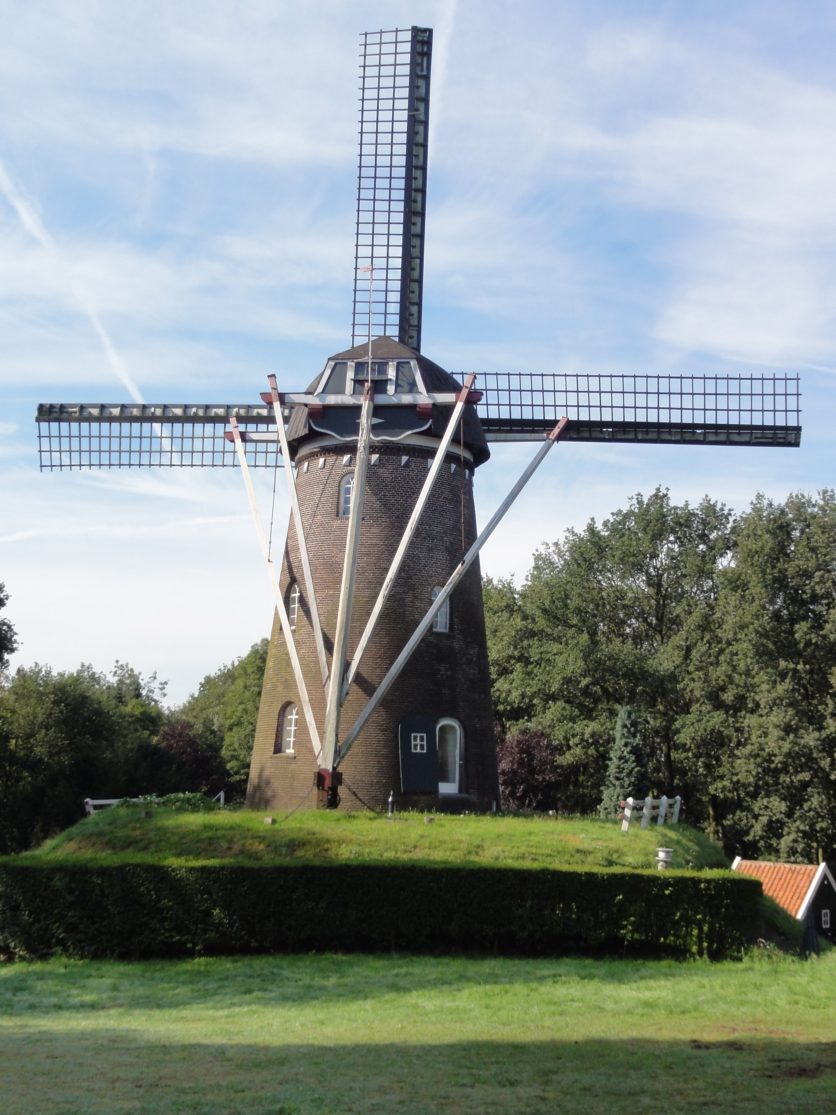 Bergharen (Wijchen) Rijksmonument 9303 Molen op Kapelberg 56″ N, 5° 40′ 30.46″ E Object location51° 51′ 19.59″ N, 5° 40′ 29.57″ E